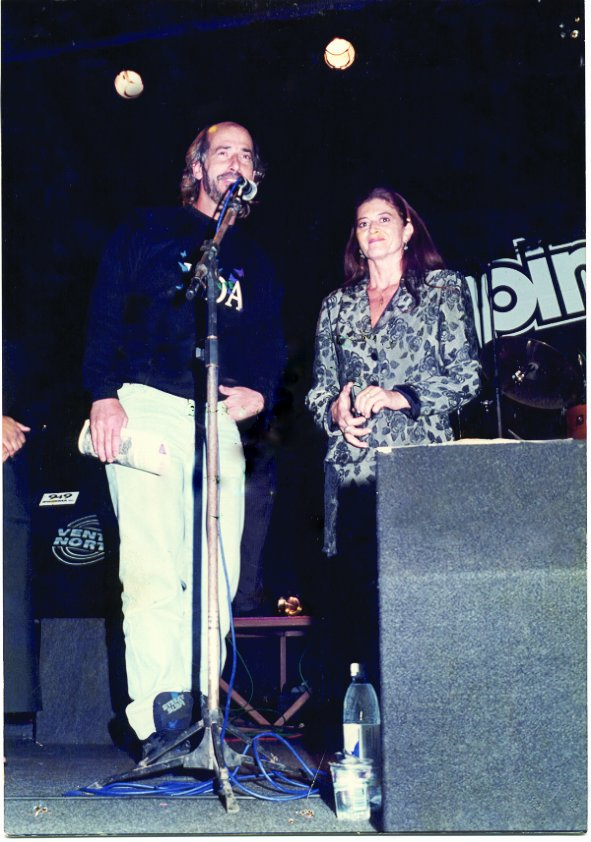 Discursos de Regis Gonzaga e Diza Gonzaga no Lançamento do Programa VIDA URGENTE da Fundação Thiago de Moraes Gonzaga